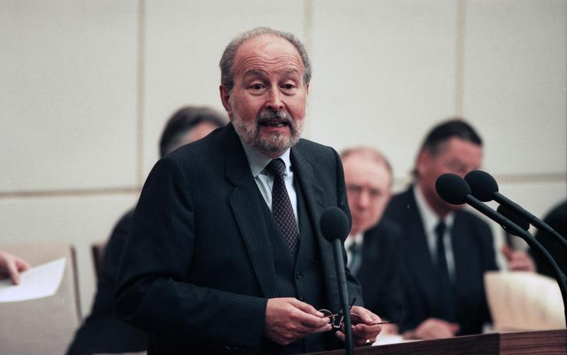 Bonn, 14.12.1990 In der ersten Sitzung des gesamtdeutschen Bundesrates in Bonn traf die Länderkammer die Entscheidung, die Beamtenbesoldung in den neuen Bundesländern für den Bereich der leitenden Beamten zu verbessern. Die neuen Bundesländer sollen ermächtigt werden, die im Einigungsvertrag vorgesehenen 35% eines entsprechenden westdeutschen Gehaltes durch einen nicht ruhegehaltsfähigen Zuschuß von 14% aufzustocken. Die Entscheidung des Bundesrates muß durch die Bundesregierung in Kraft gesetzt werden.